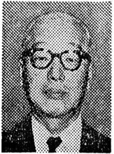 윤치창